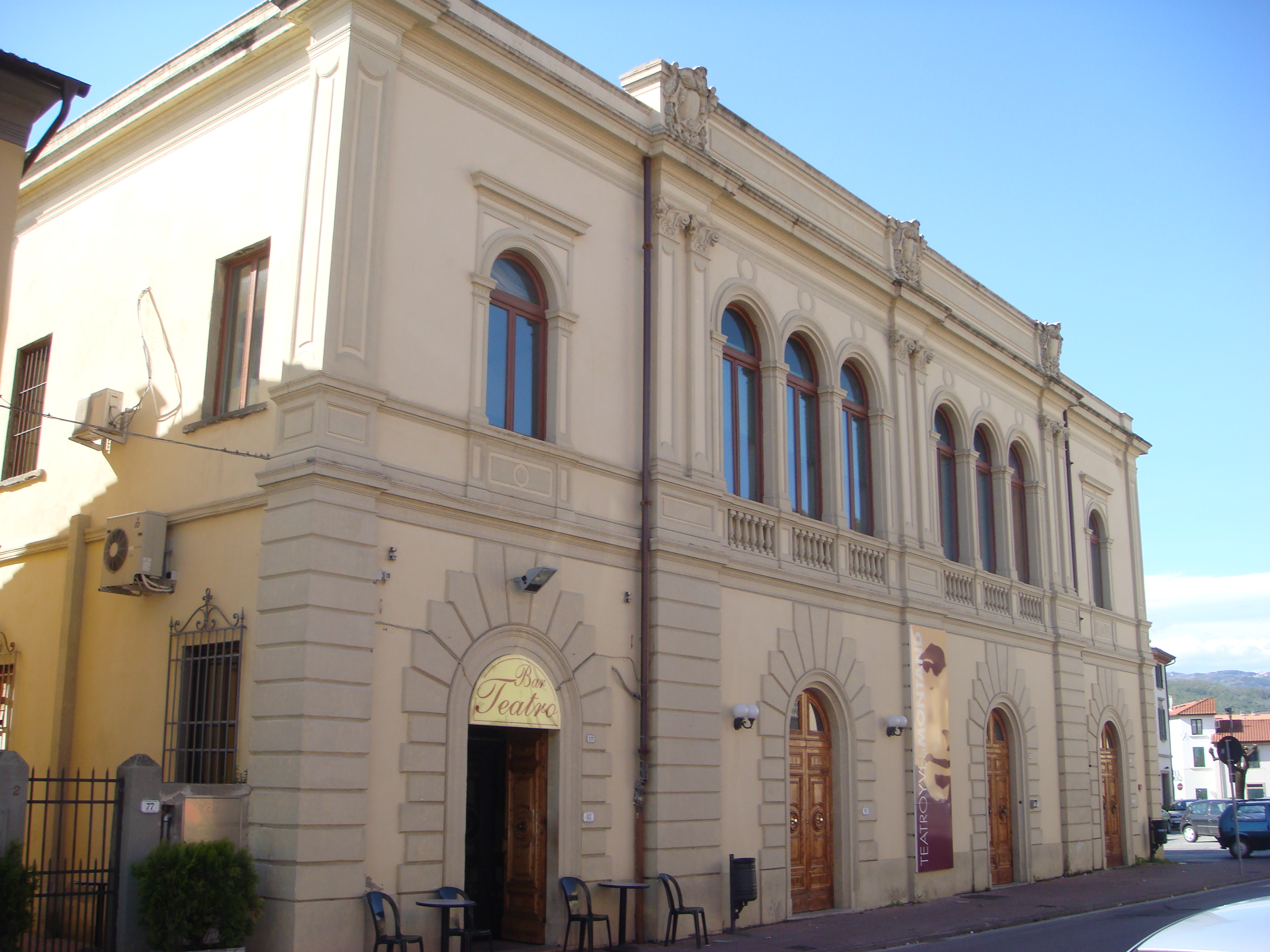 Facciata del Teatro Yves Montand di Monsummano Terme (Provincia di Pistoia, Italia)